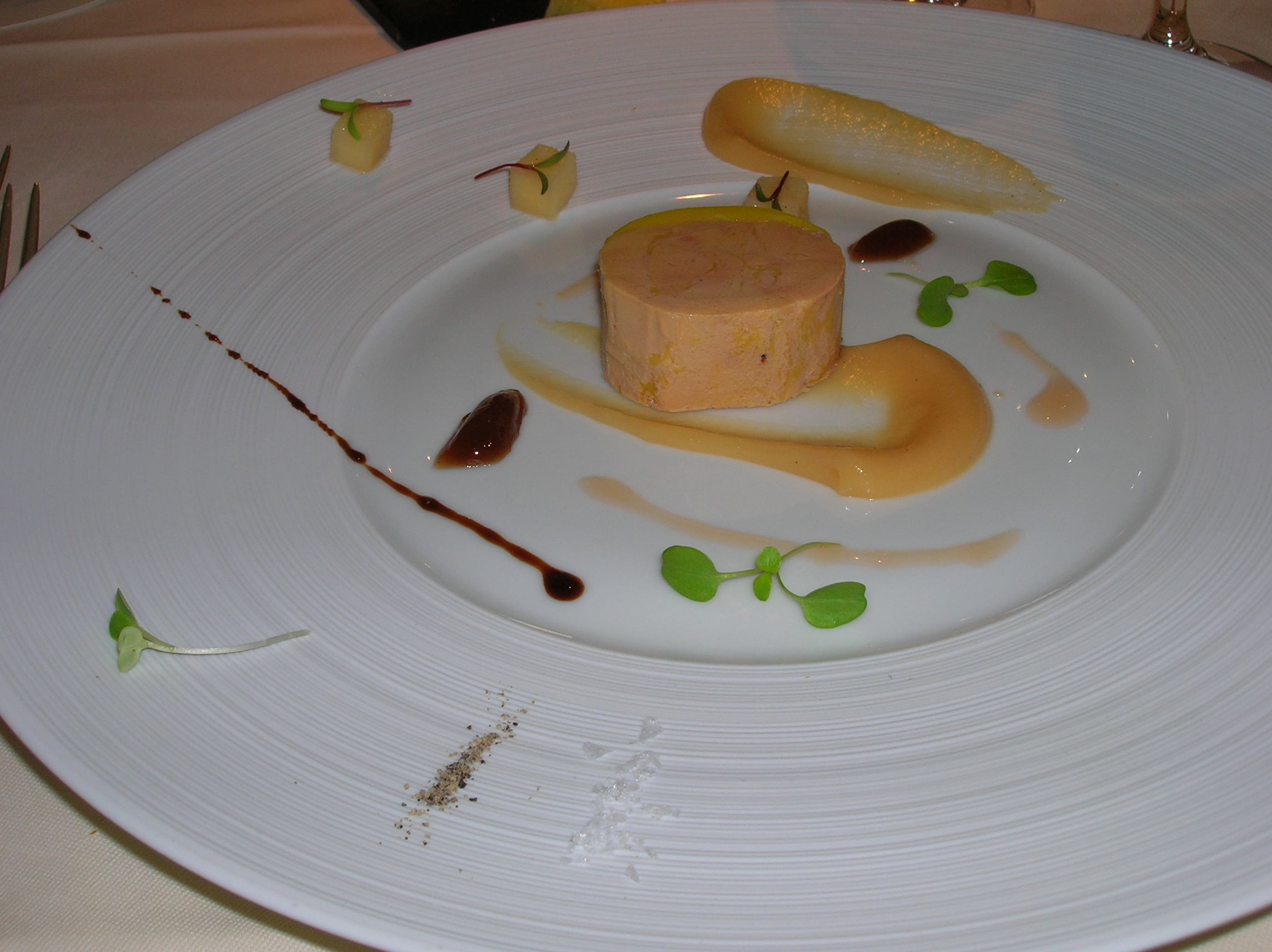 לה מנואר או קואט סזון